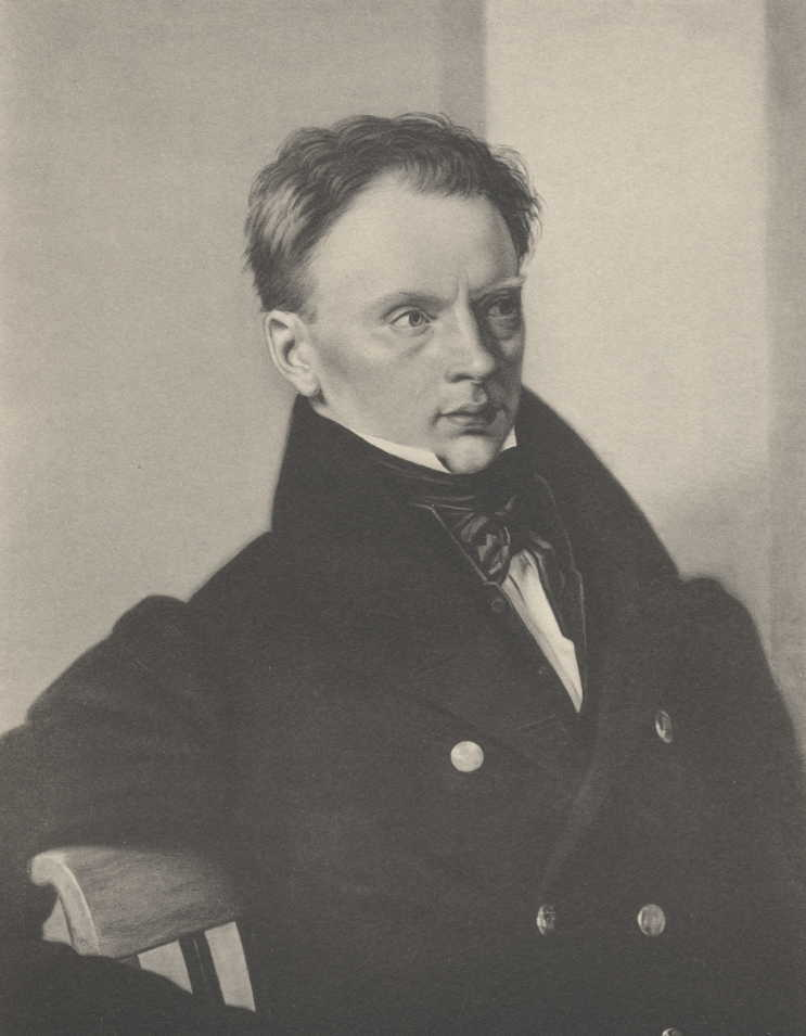 Bild des Greifswalder Professors Ernst Stiedenroth